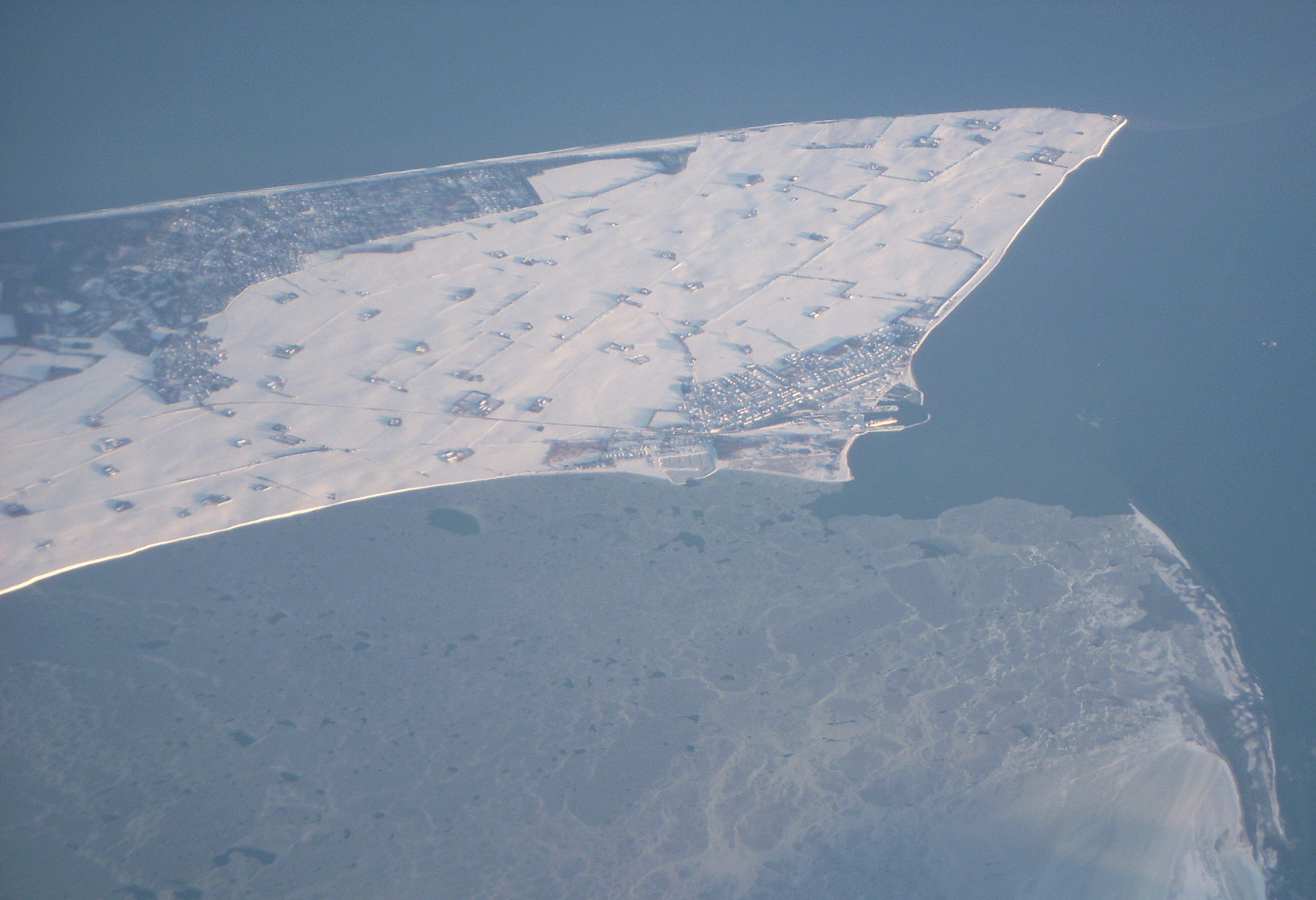 Südspitze der Insel Falster (Gedser Odde) mit Meereisbildung im Dezember 2010